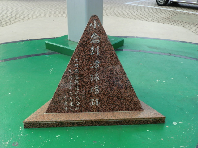 北九州市にあった到津球場の跡です。